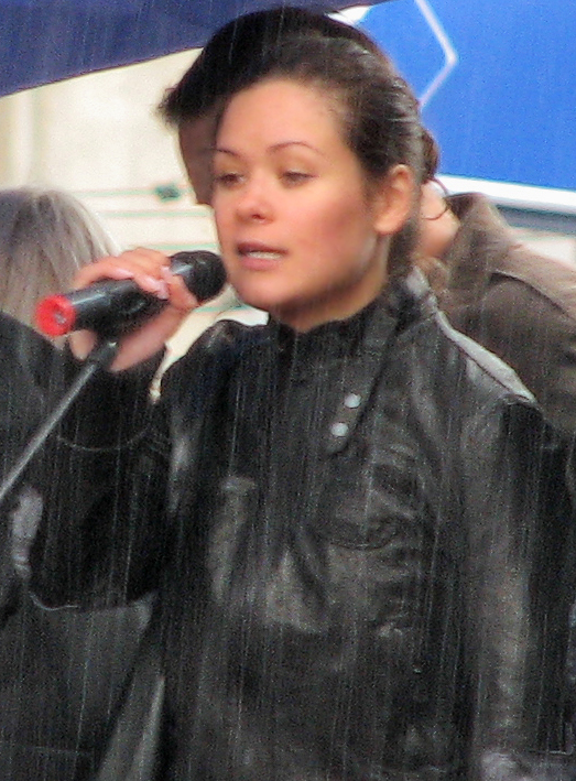 Мария Гайдар на трибуне массового митинга памяти Анны Политковской 7 октября 2007 года в Москве. Этот файл — часть фоторепортажа с митинга.